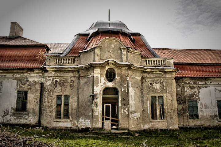 Gávavencsellő Dessewffy kastély bejárat This is a photo of a monument in Hungary, Identifier: 8237